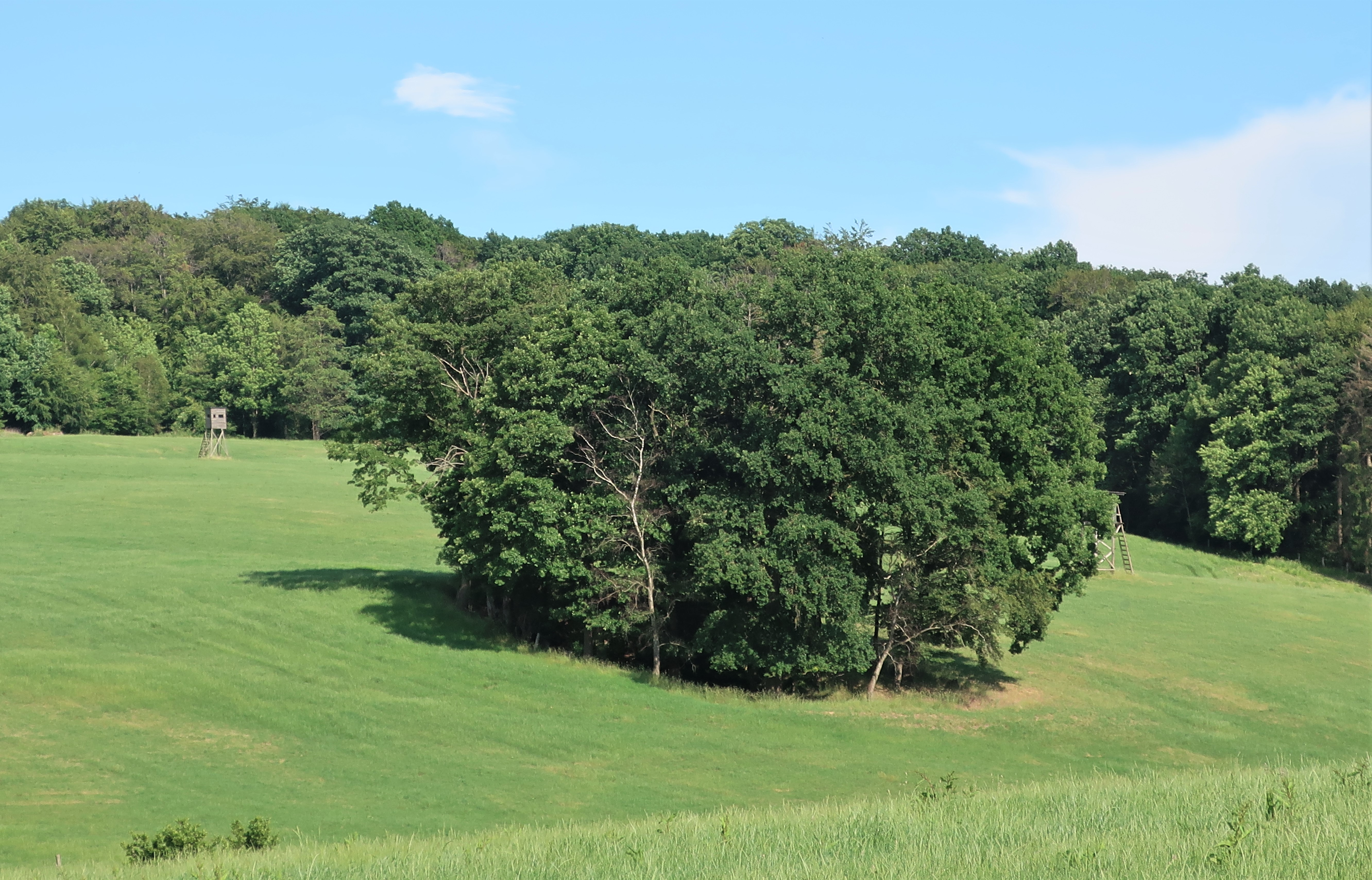 Geschützter Landschaftsbestandteil 1.4.2.29 „Eichenwäldchen und Quellwiese Elsebach“ in Hagen, östlich des Elsebaches bei Tiefendorf. Es handelt sich um ein Eichenwäldchen und um einen Quellbereich in einer Wiese.